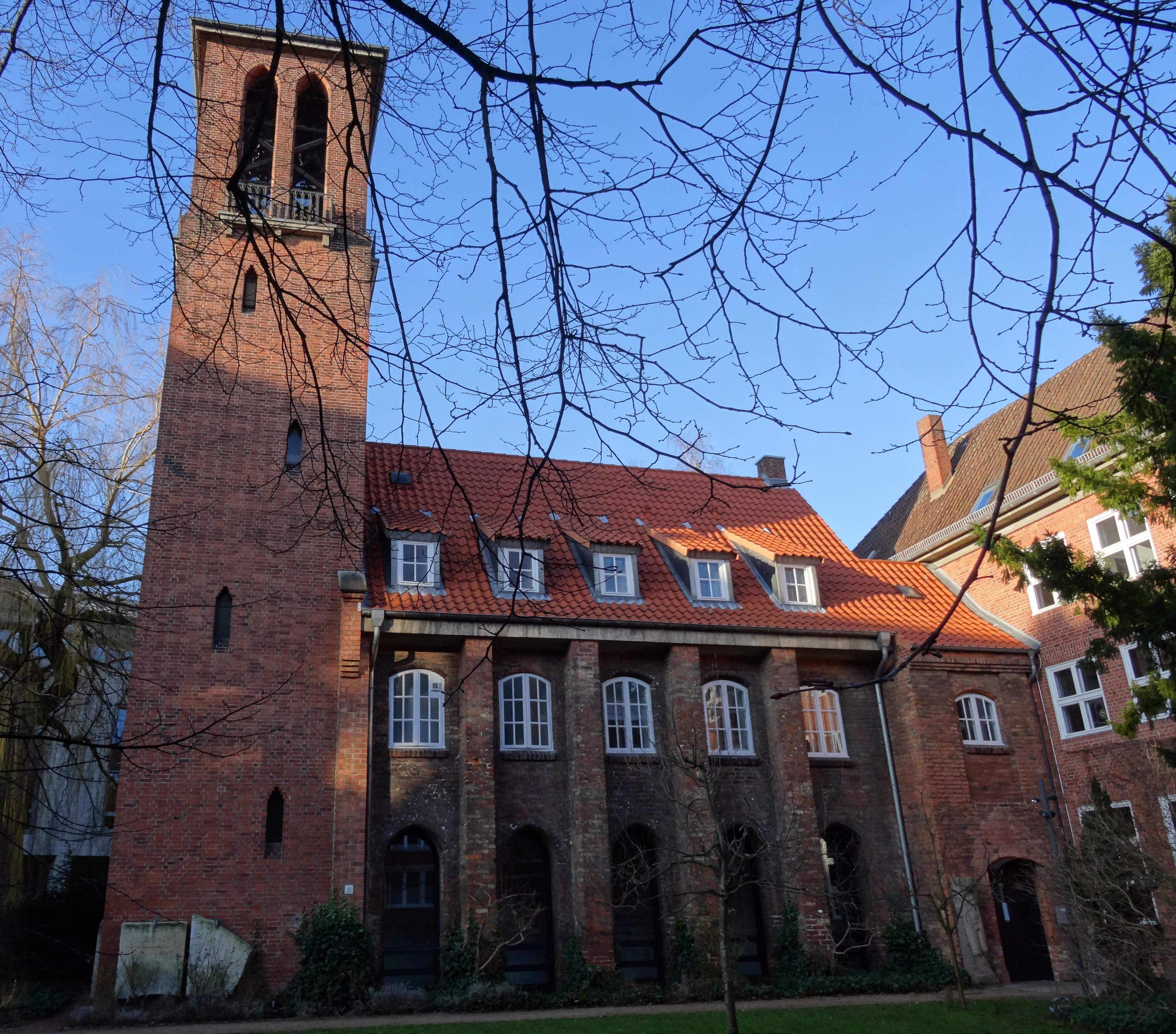 Ehemaliges Franziskanerkloster in Kiel, heute Kieler Kloster (Klosterkirchhof 2-6)